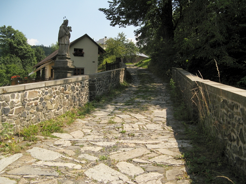 Silniční most - mostek (Čermná), Čermná, Čermná (Libouchec).